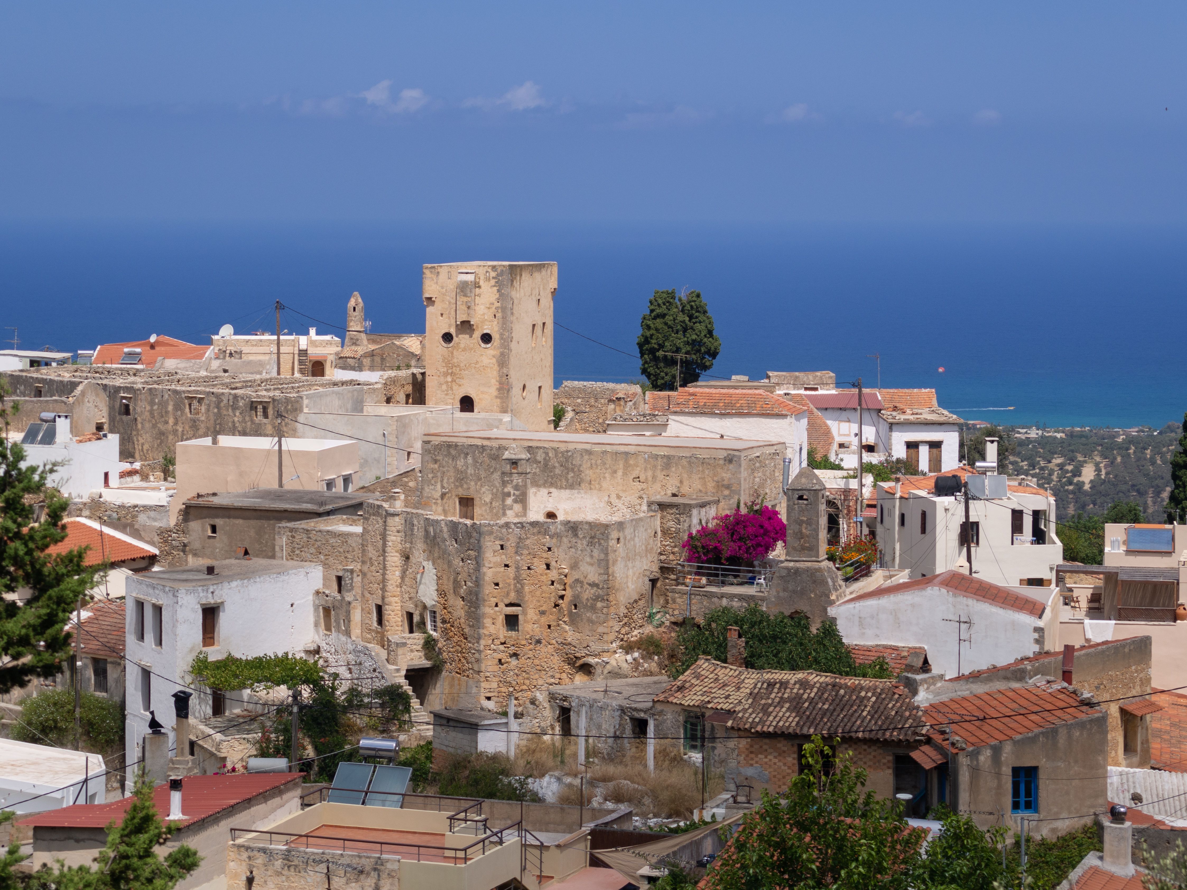 Μαρουλάς Ρεθύμνης (οικισμός)«Μαρουλάς Ρεθύμνης (οικισμός)»